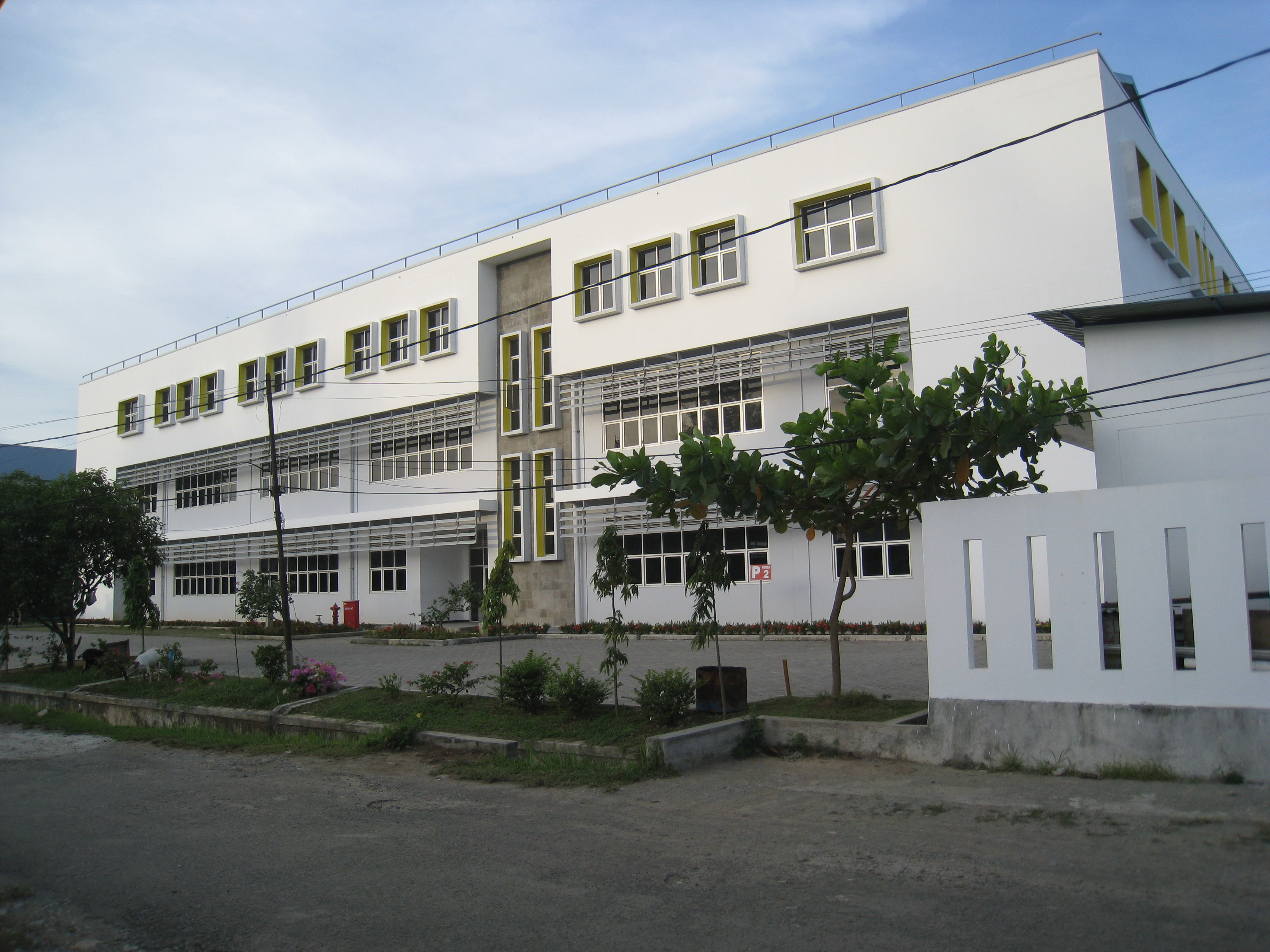 Fasilitas bangunan baru Fakultas Keguruan dan Ilmu Pendidikan Universitas Syiah Kuala tampak dari luar.